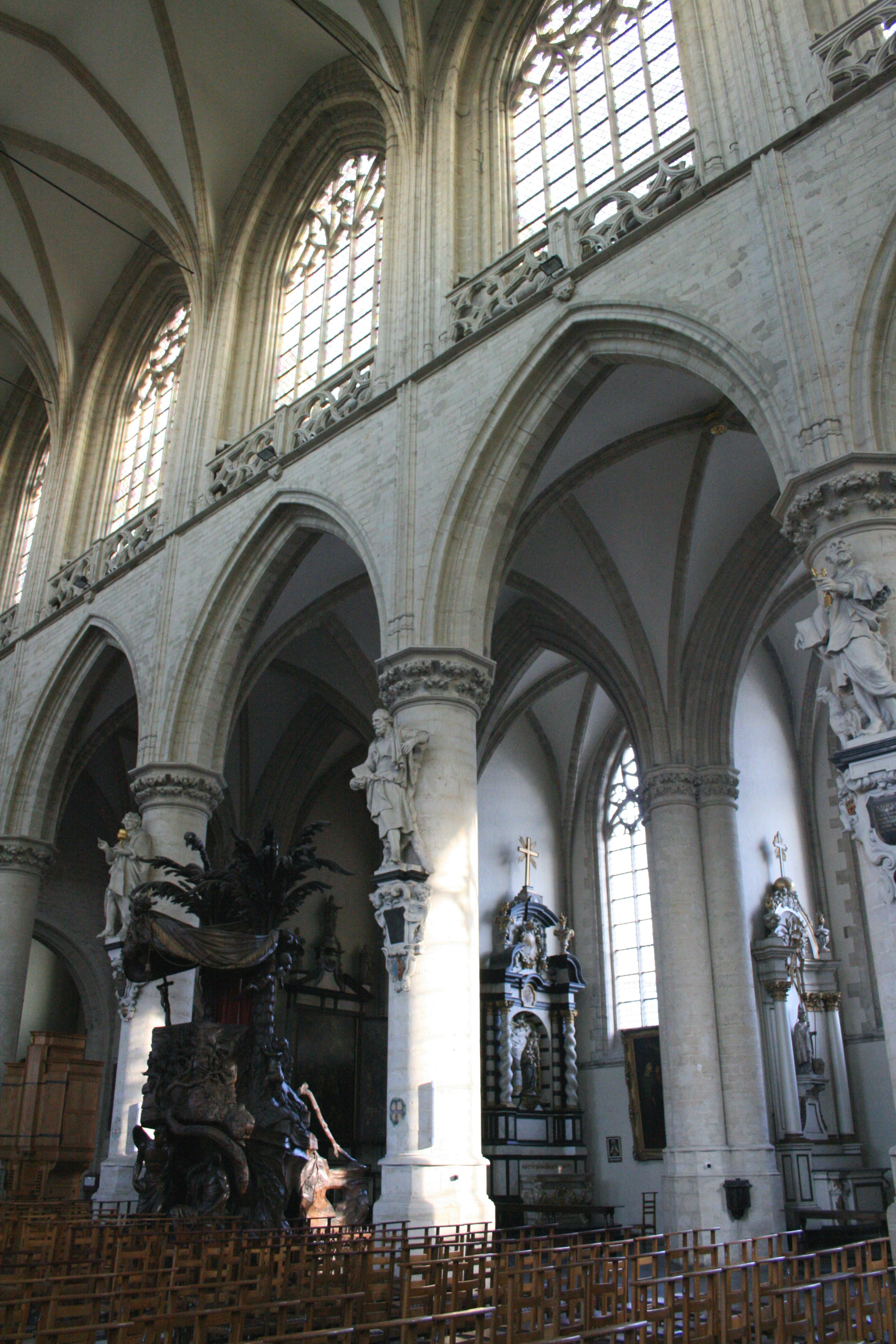 Onze-Lieve-Vrouw ter Kapelle, Kapellemarkt, Brussel (België). Zicht op het het gotische schip en de barokke preekstoel